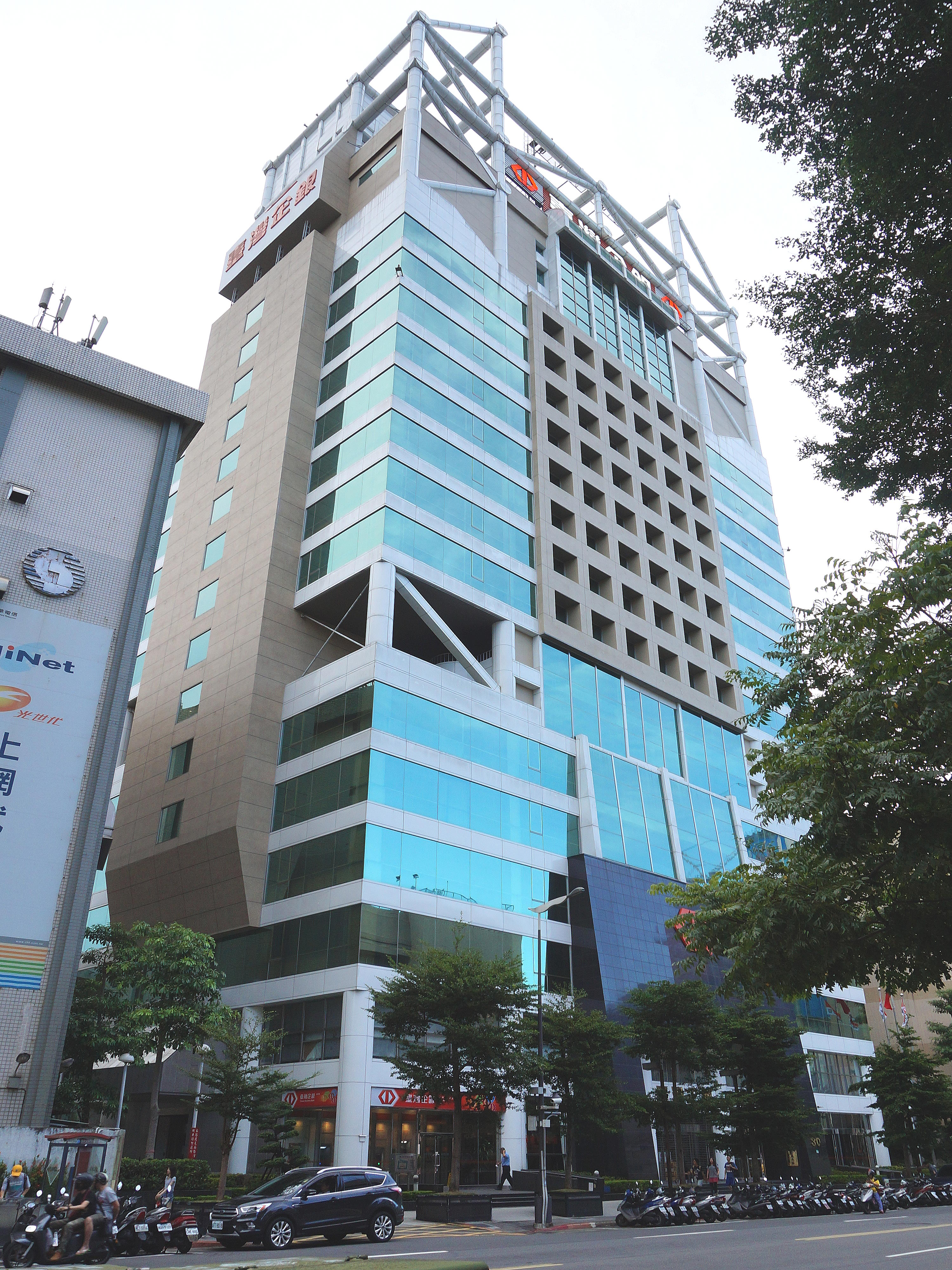 臺灣中小企業銀行總行，位於臺北市大同區塔城街30號。